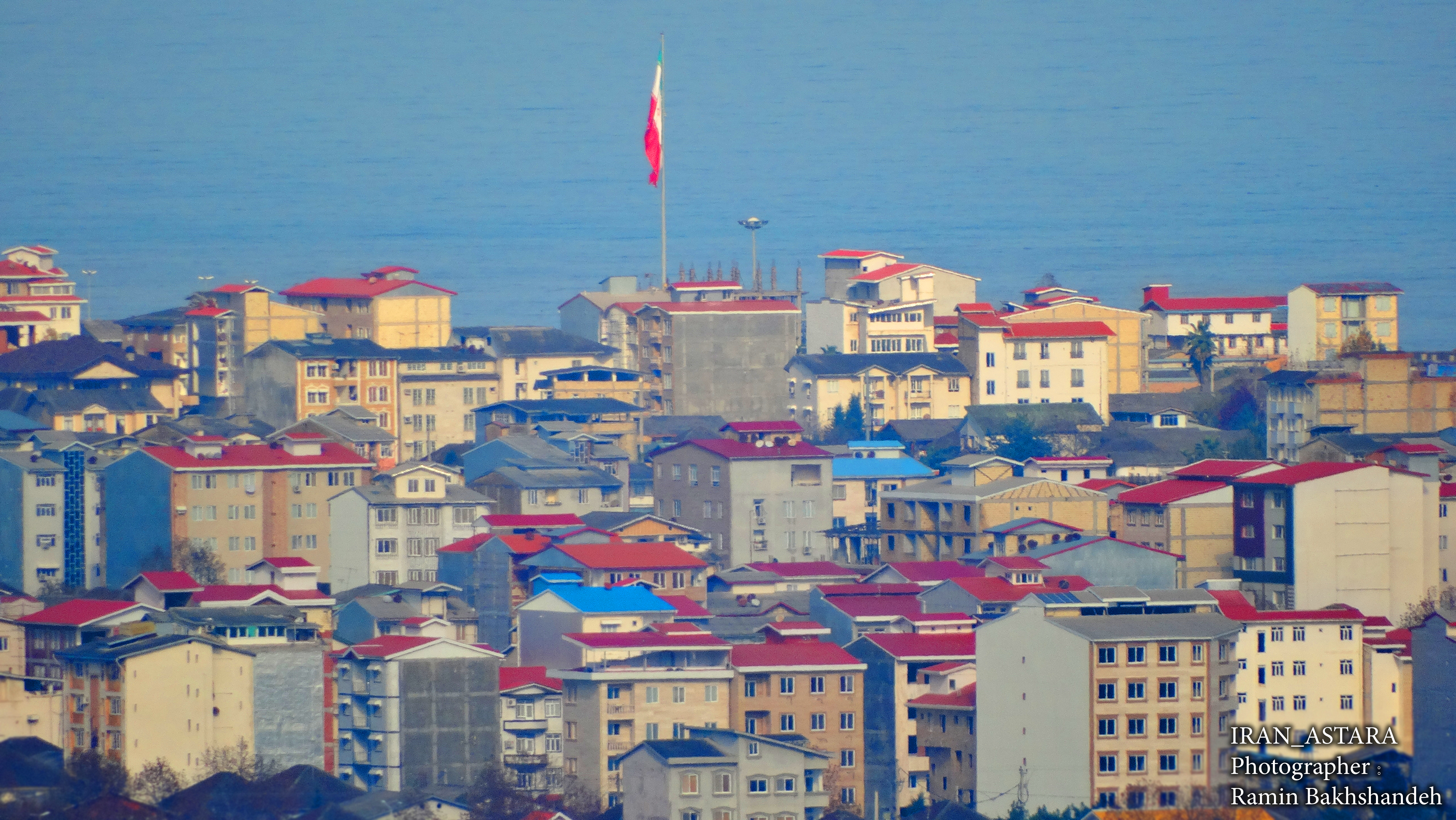 شهرستان بندر مرزی استارا عکسی زیبا و خاص از نمایی متفاوت عکاس : رامین بخشنده